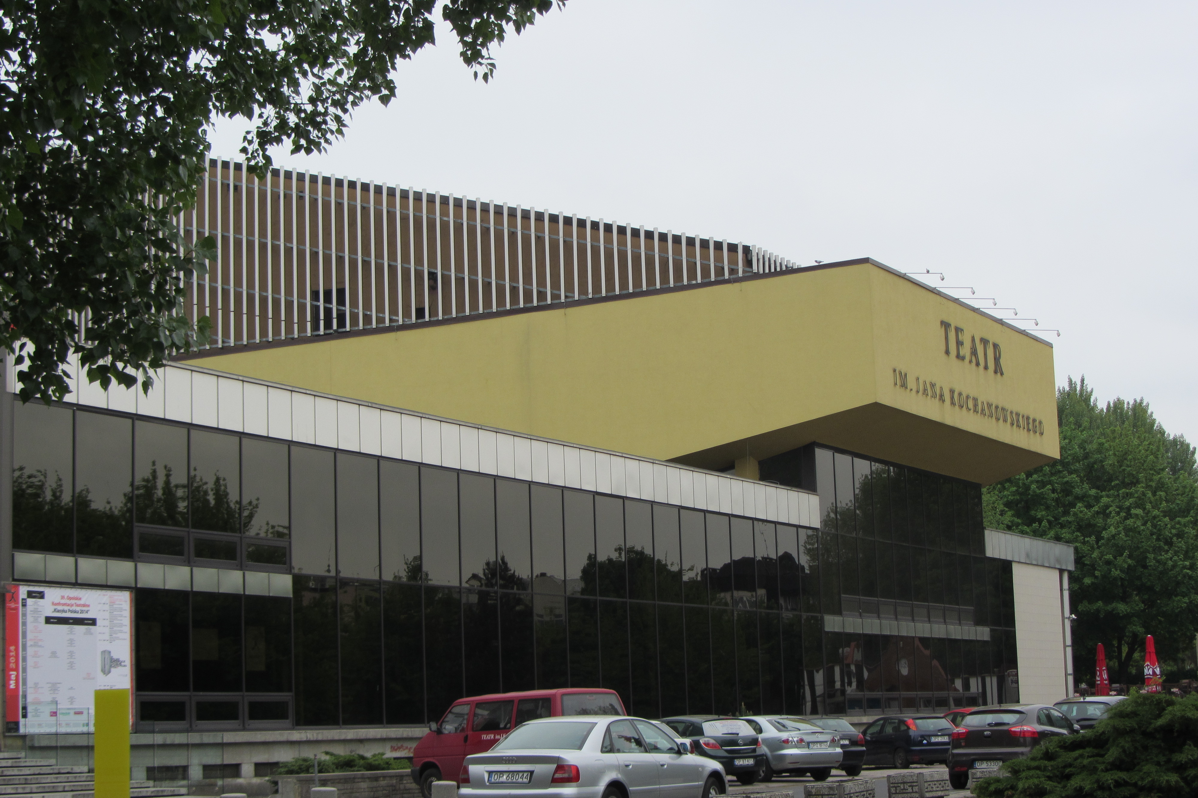 Theater Jana Kochanowskiego in Oppeln (poln. Opole)